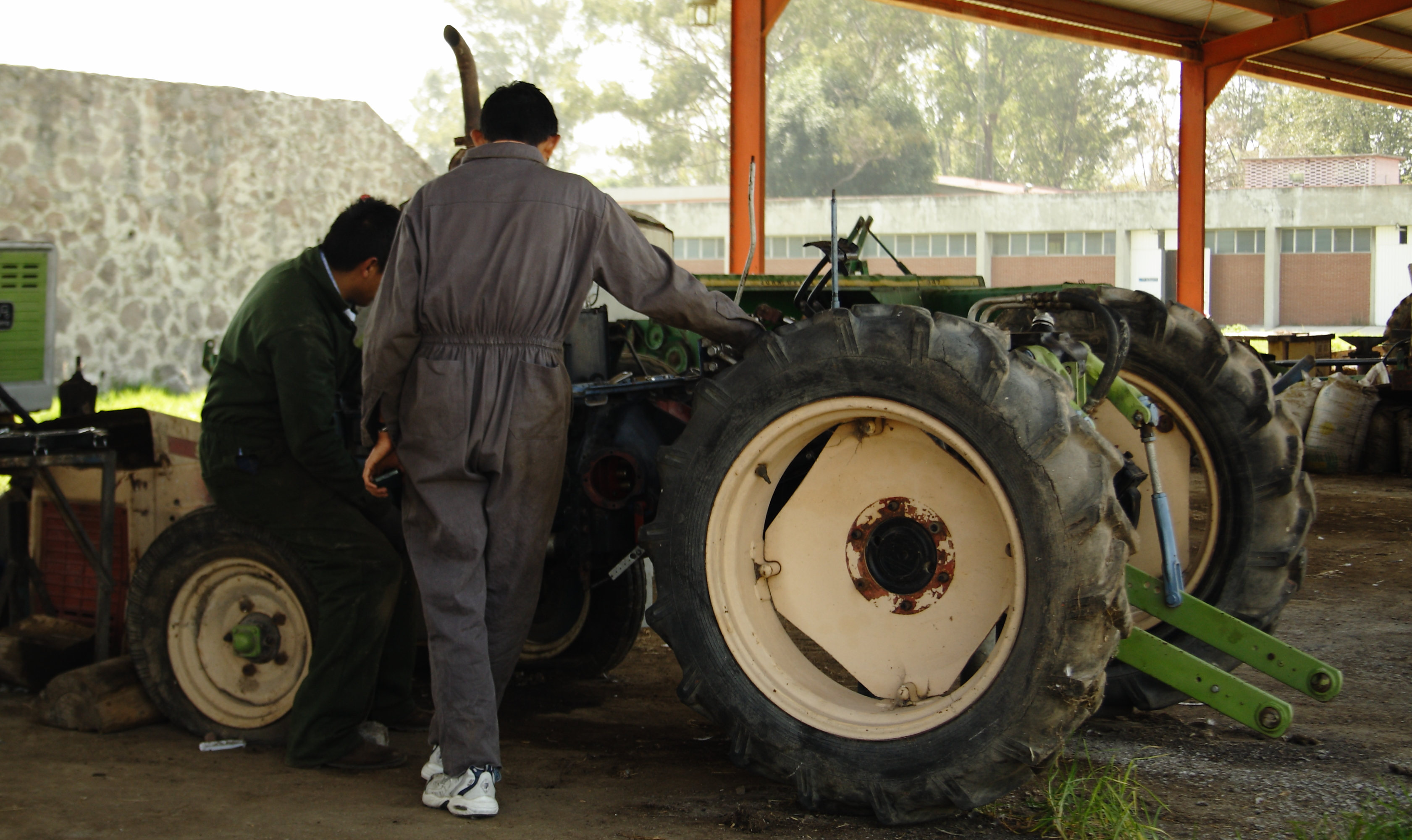 Reparación de tractor en un taller.